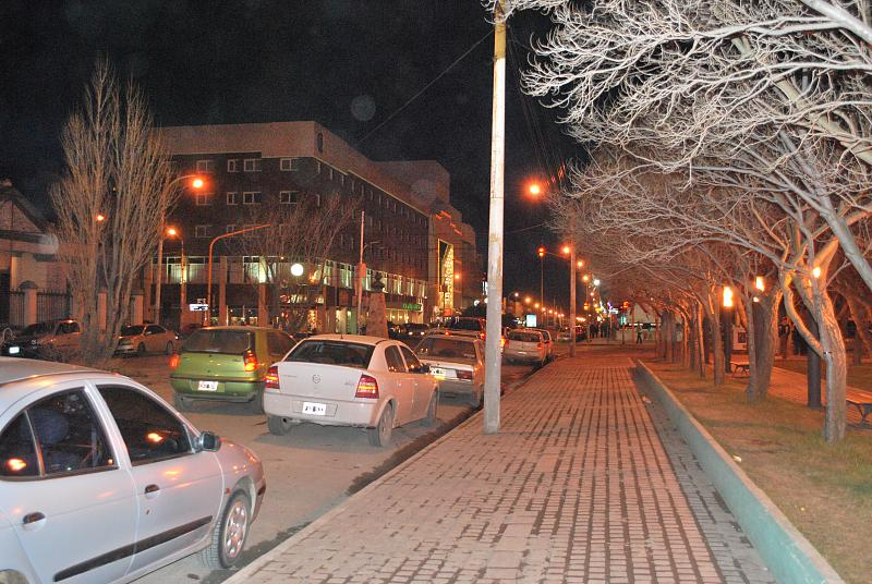 San Martín Avenue, Río Gallegos, Santa Cruz Province, Argentina.